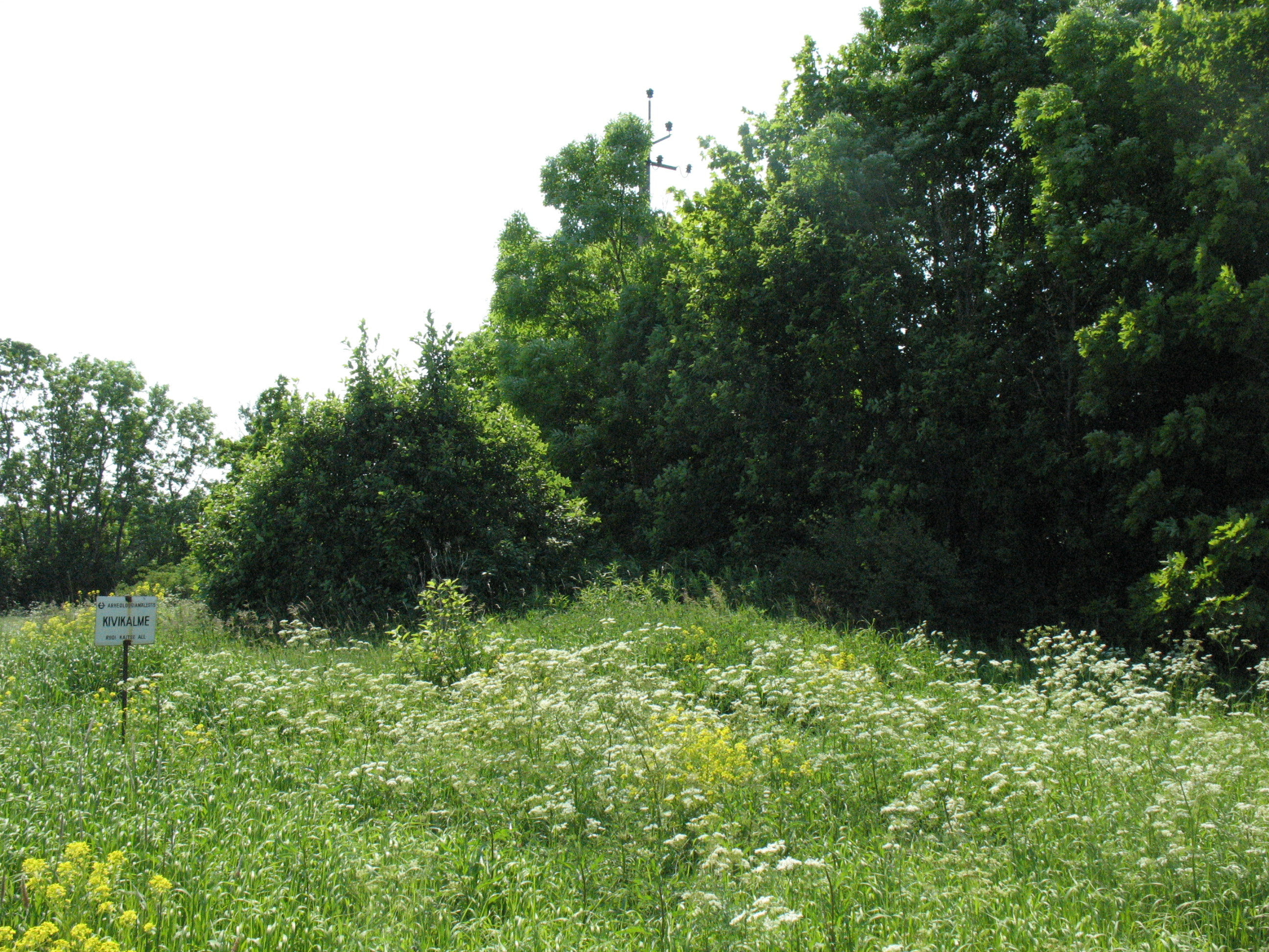 Harju maakond, Harku vald, Muraste küla